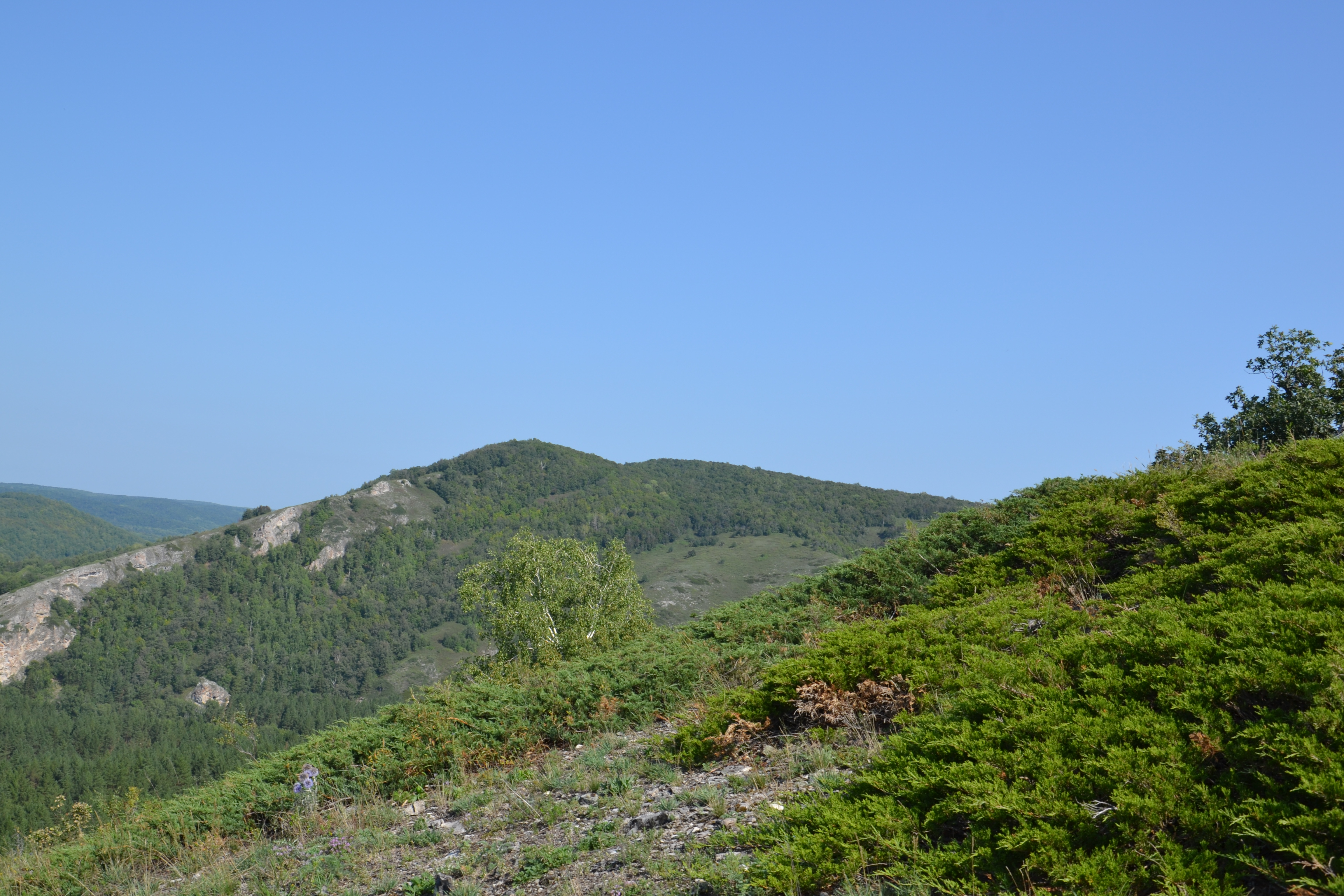 Мурадымовское ущелье, Бурзянский район This image is related to the protected area of Russia number 0210102